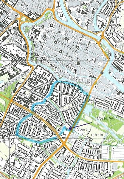 Op de kaart is met blauw de Achtermeerpolder aangegeven. De polder ligt nu binnen de bebouwde kom van Alkmaar. De zwarte pijl geeft locatie van het Dieselgemaal Alkmaar aan.